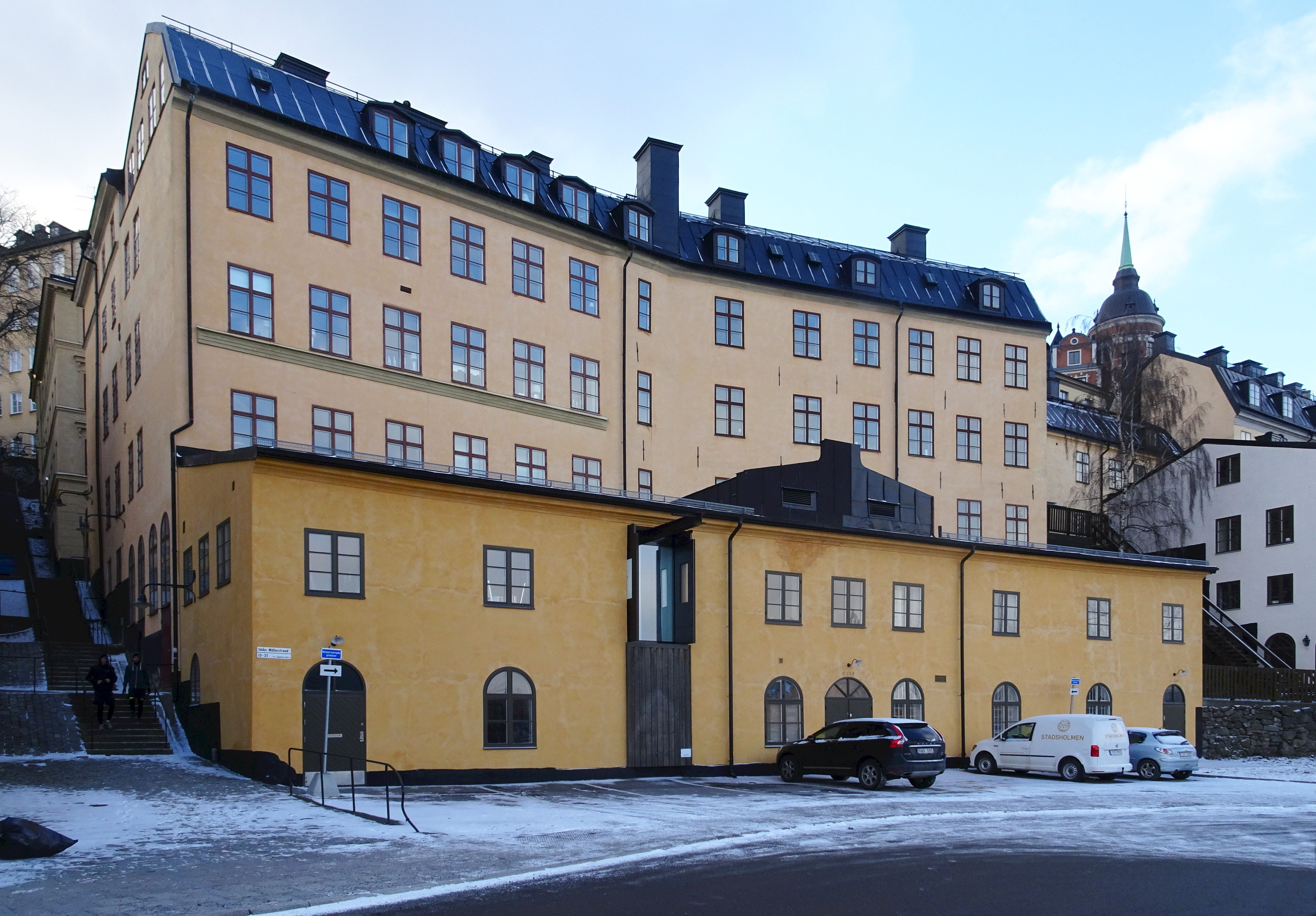 Kvarteret Lappskon större mot Söder Mälarstrand